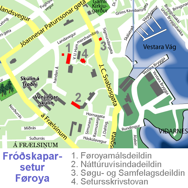 Føroyskt: Fróðskaparsetur Føroya.